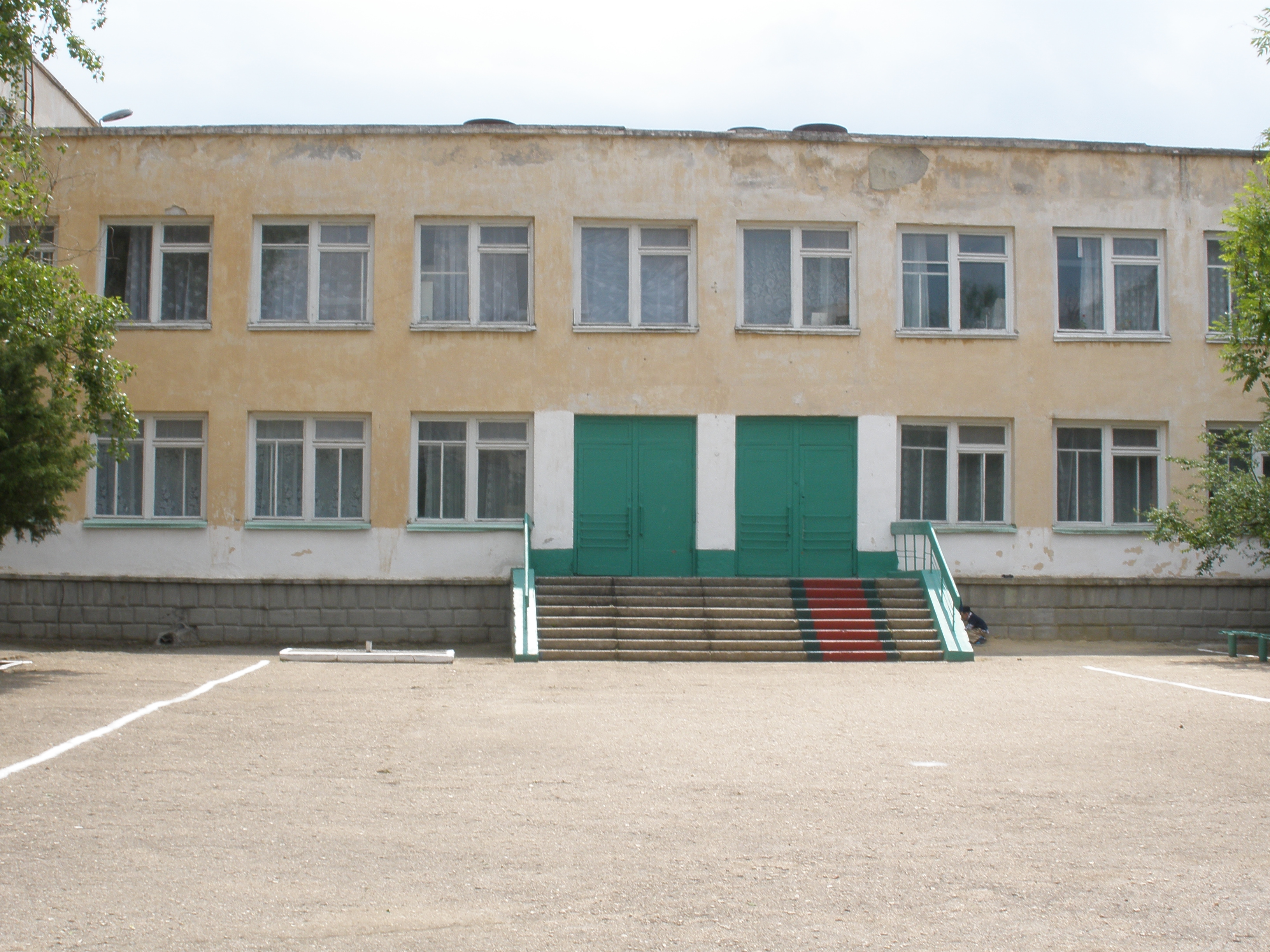 Школа №9 (Новоозёрное)